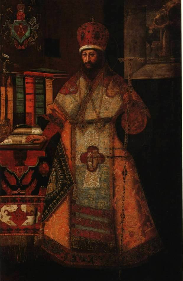 Неизвестный художник второй половины 18 века. Портрет митрополита Димитрия Ростовского. ГРМ Портрет Димитрия Ростовского — один из многочисленных примеров посмертного портрета-иконы. Портрет характерен сочетанием элементов натурности — он восходит к прижизненному изображению Димитрия — с традициями парсуны и древнерусской иконы (застылость позы, фронтальность разворота фигуры, усиленная украшенность). Портрет часто повторялся и копировался, несколько его вариантов дошло до нашего времени.